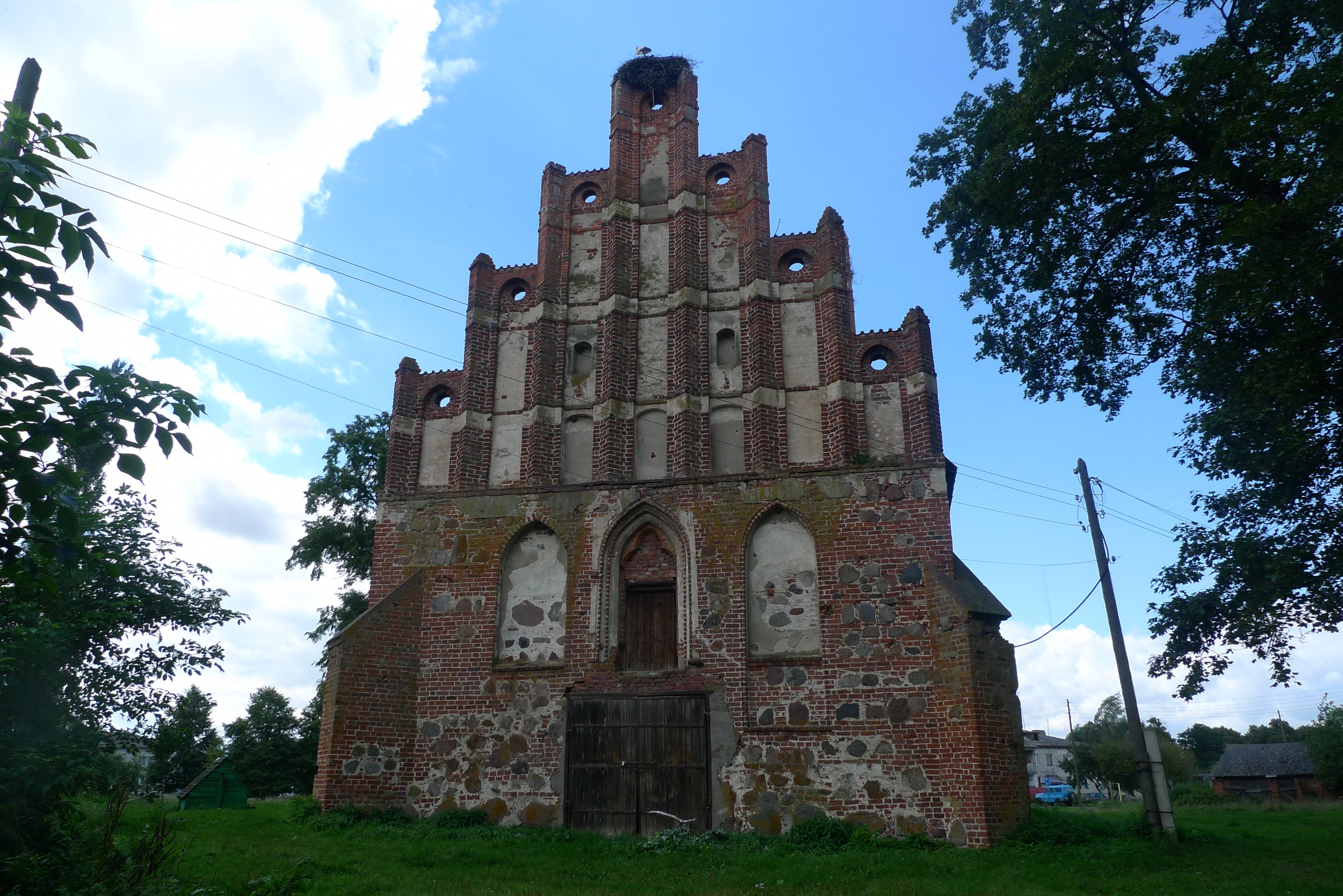 Кирха приходская: Дружба, Правдинский район, Калининградская область